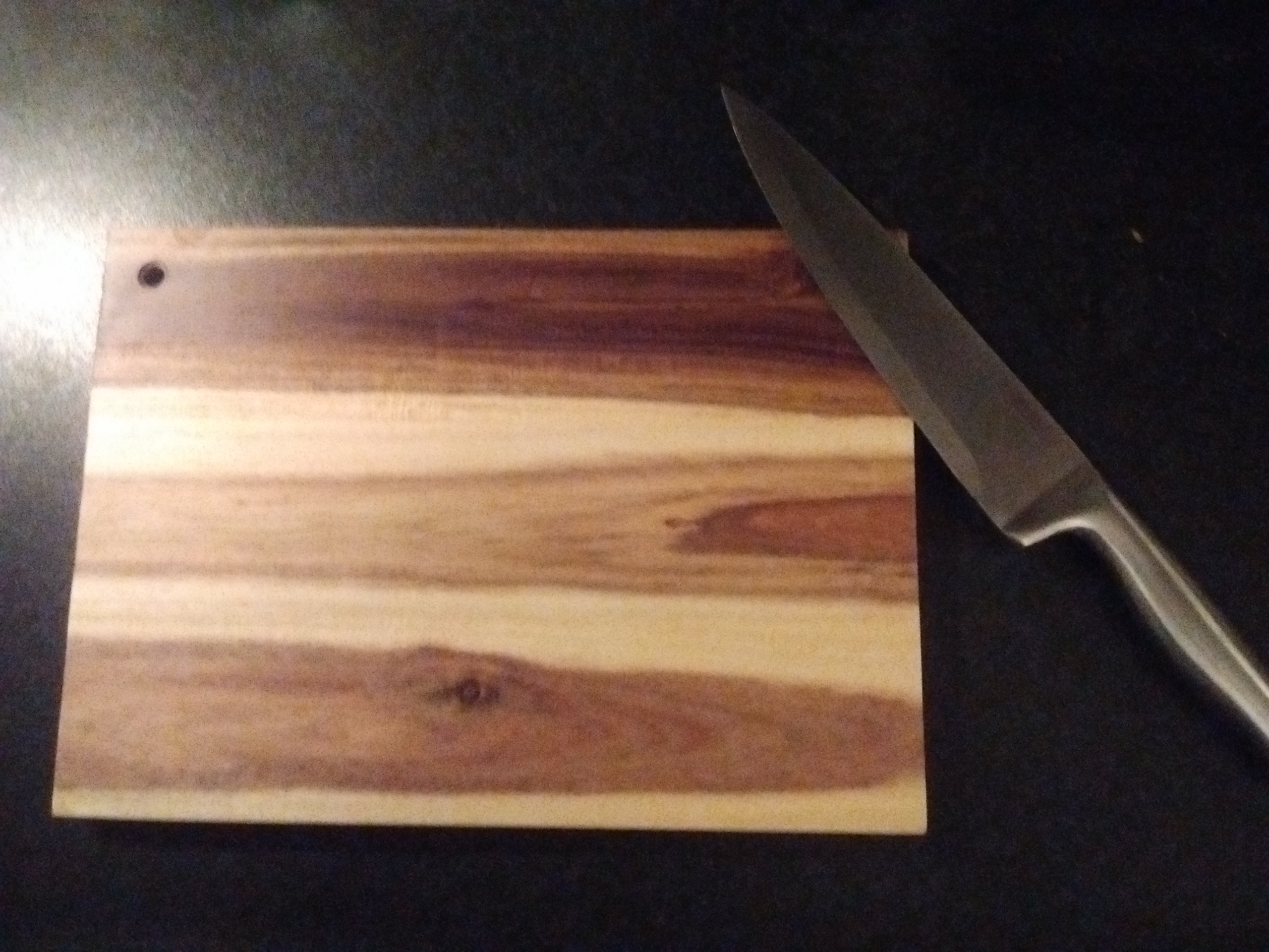 Houten snijplank met koksmes.